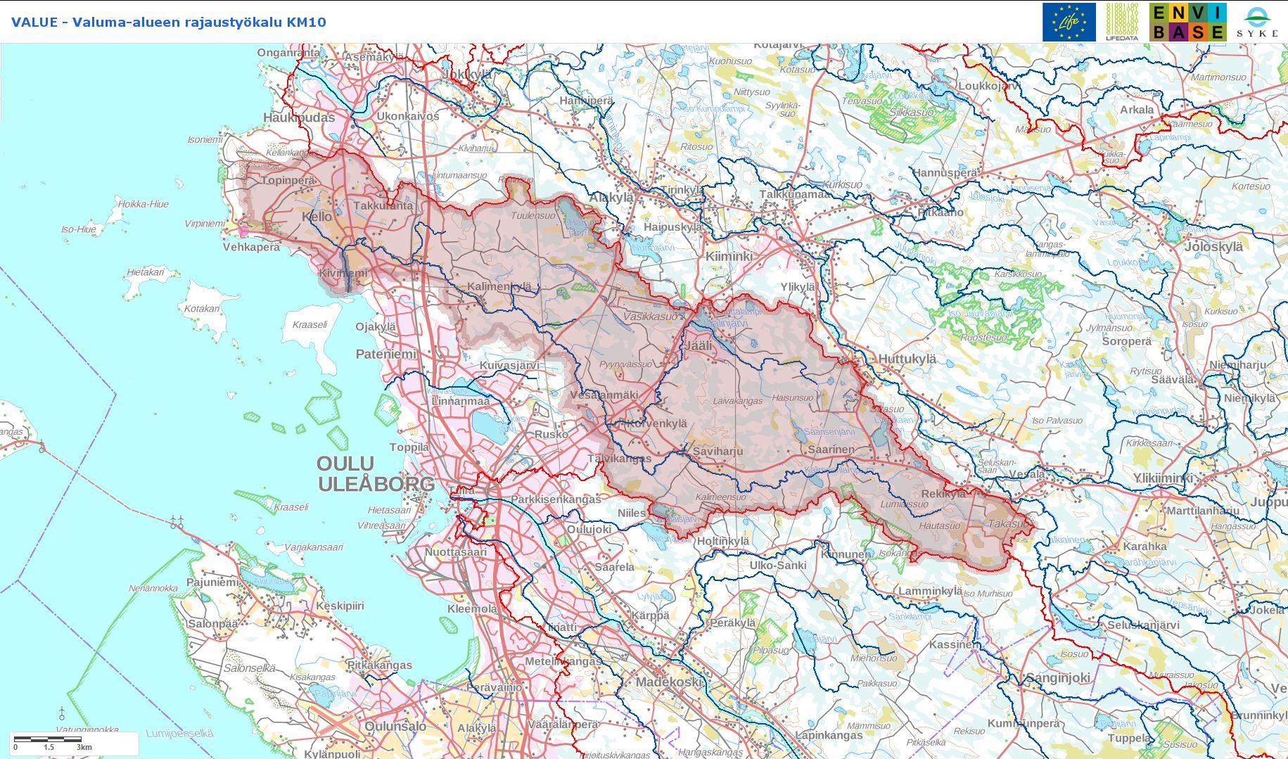 Kalimenjoen valuma-alueen kartta Suomen Ympäristökeskuksen valuma-alue palvelussa.